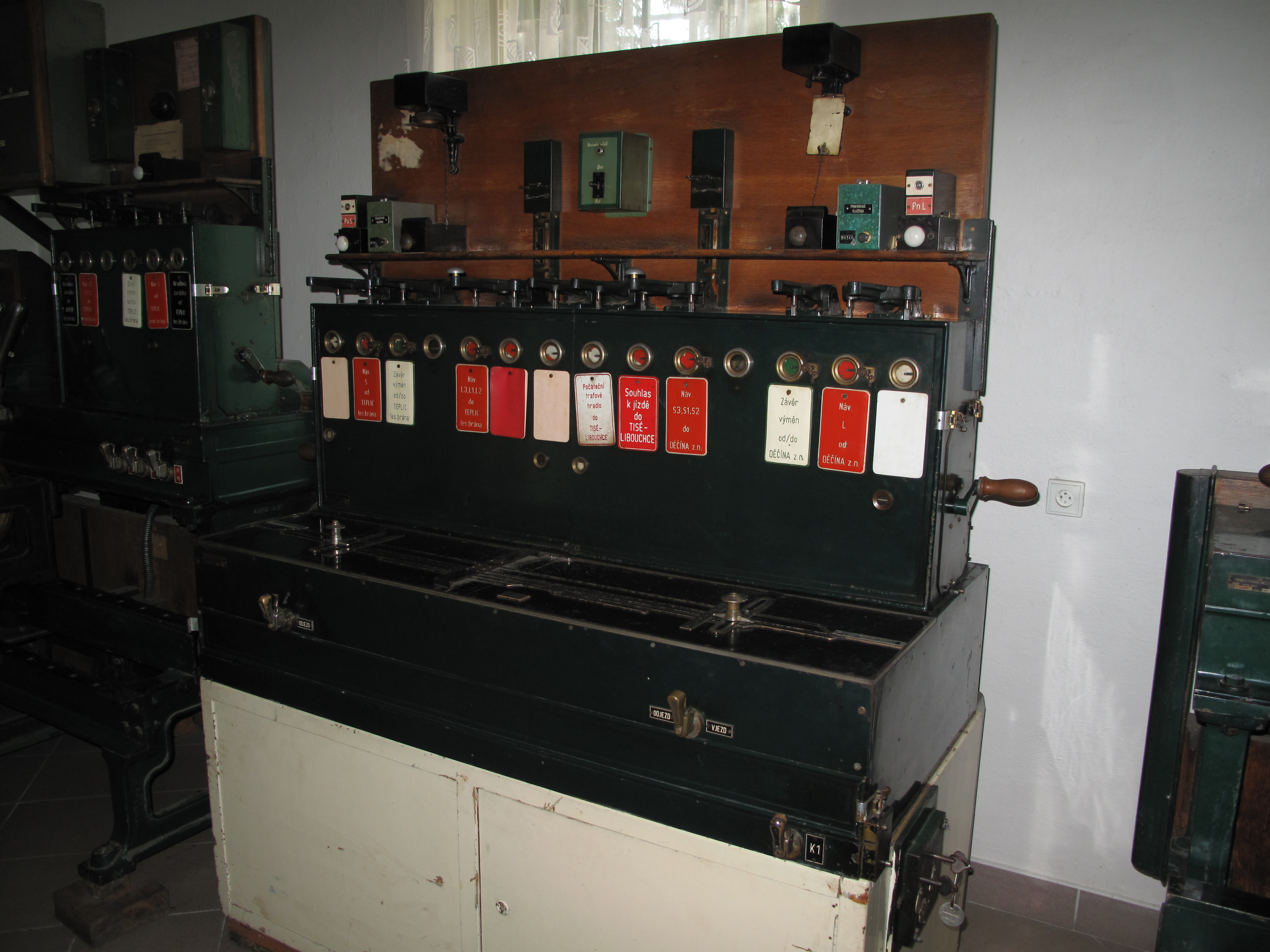 Železniční muzeum Lužná u Rakovníka